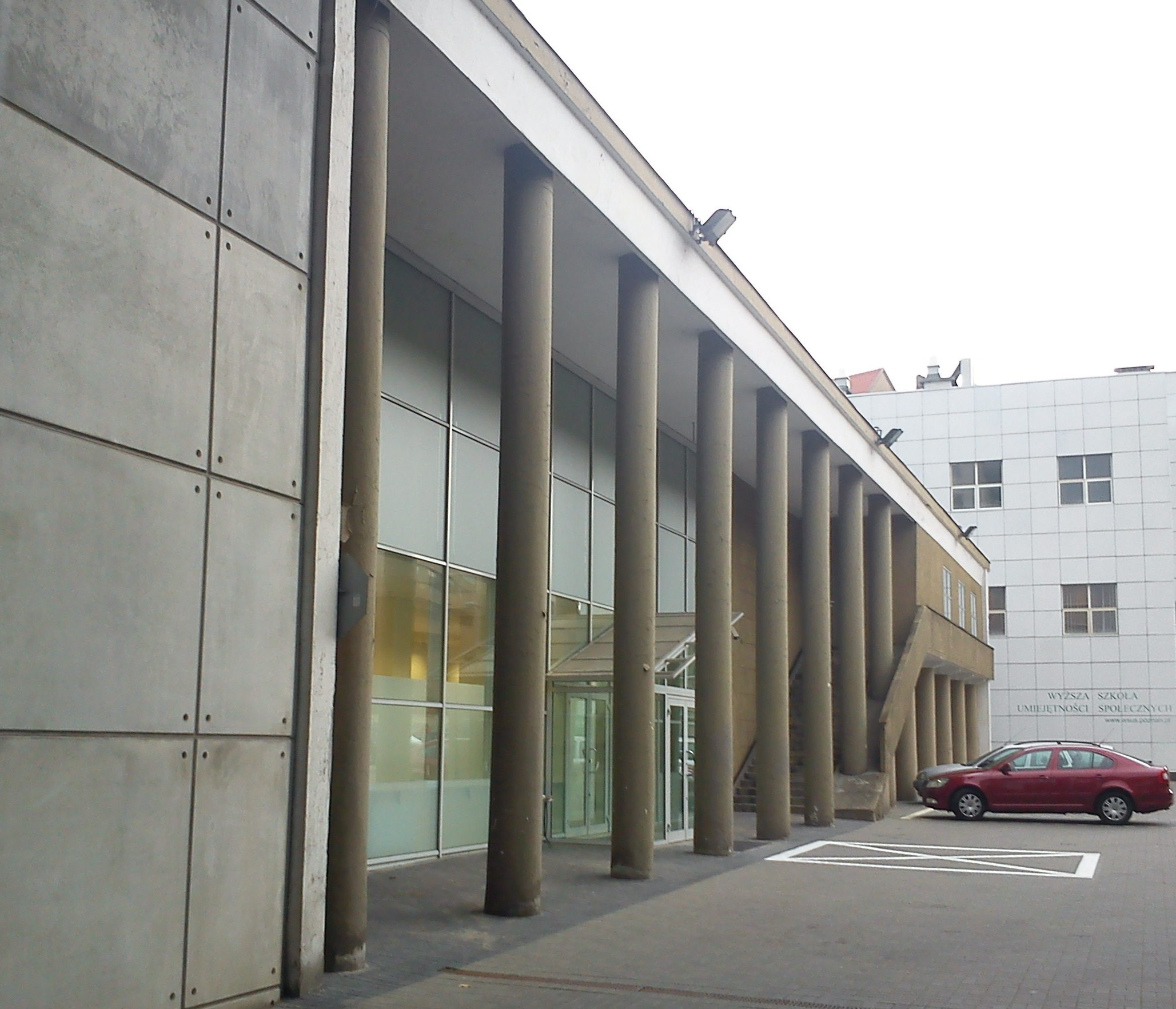 Pawilon 34, potem 102/103 na MTP, Poznań.